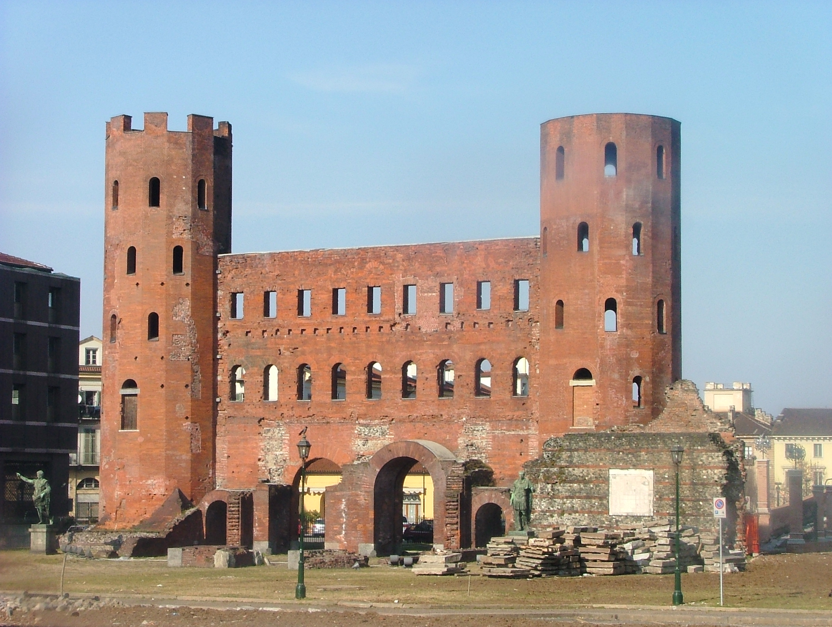 Torino, Italia